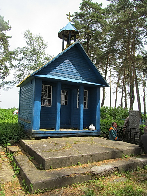 Глоўсевічы. Капліца ў імя свяціцеля Кірыла Туроўскага